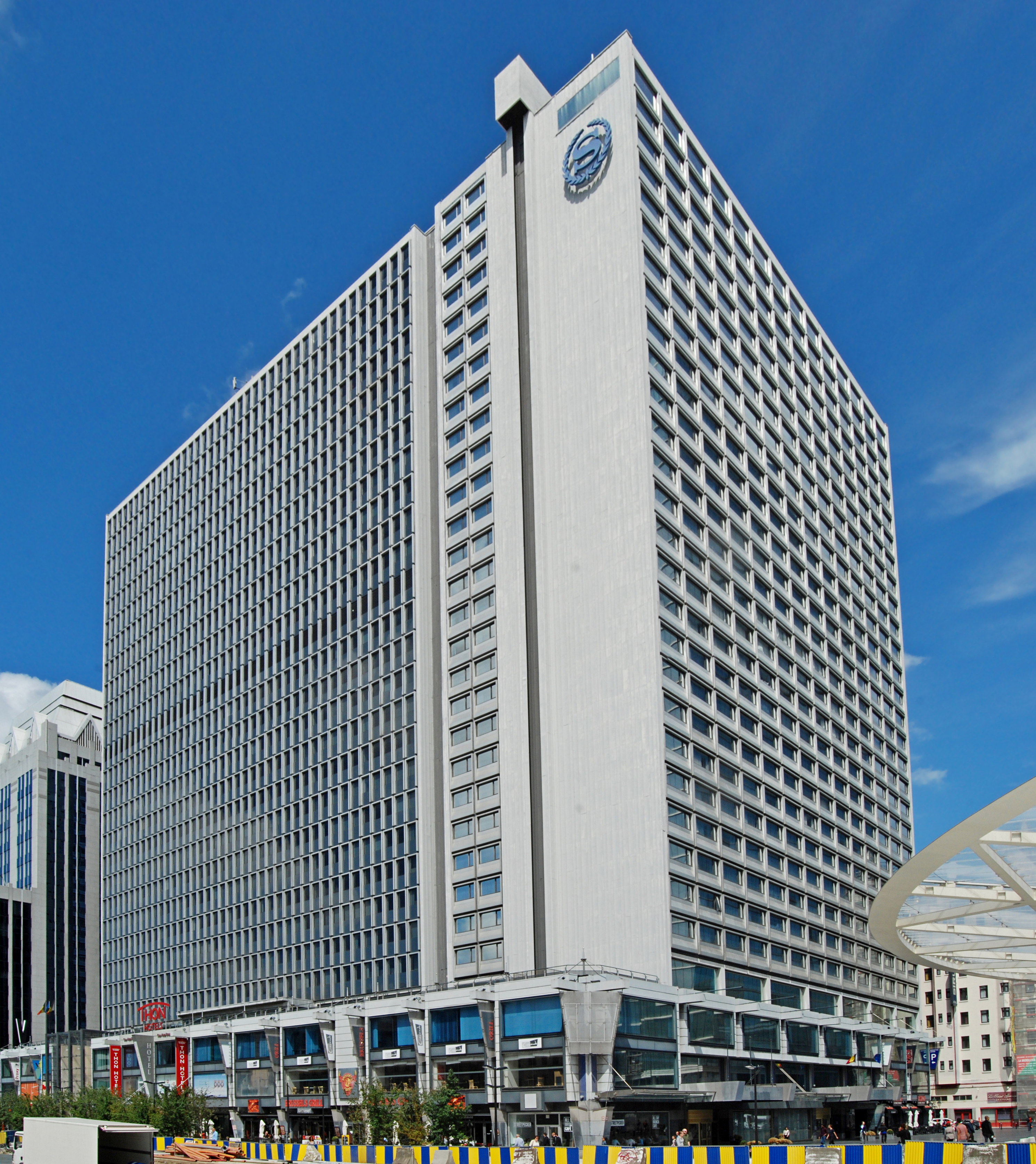 Belgique - Bruxelles - Manhattan Building (fonctionnalisme)